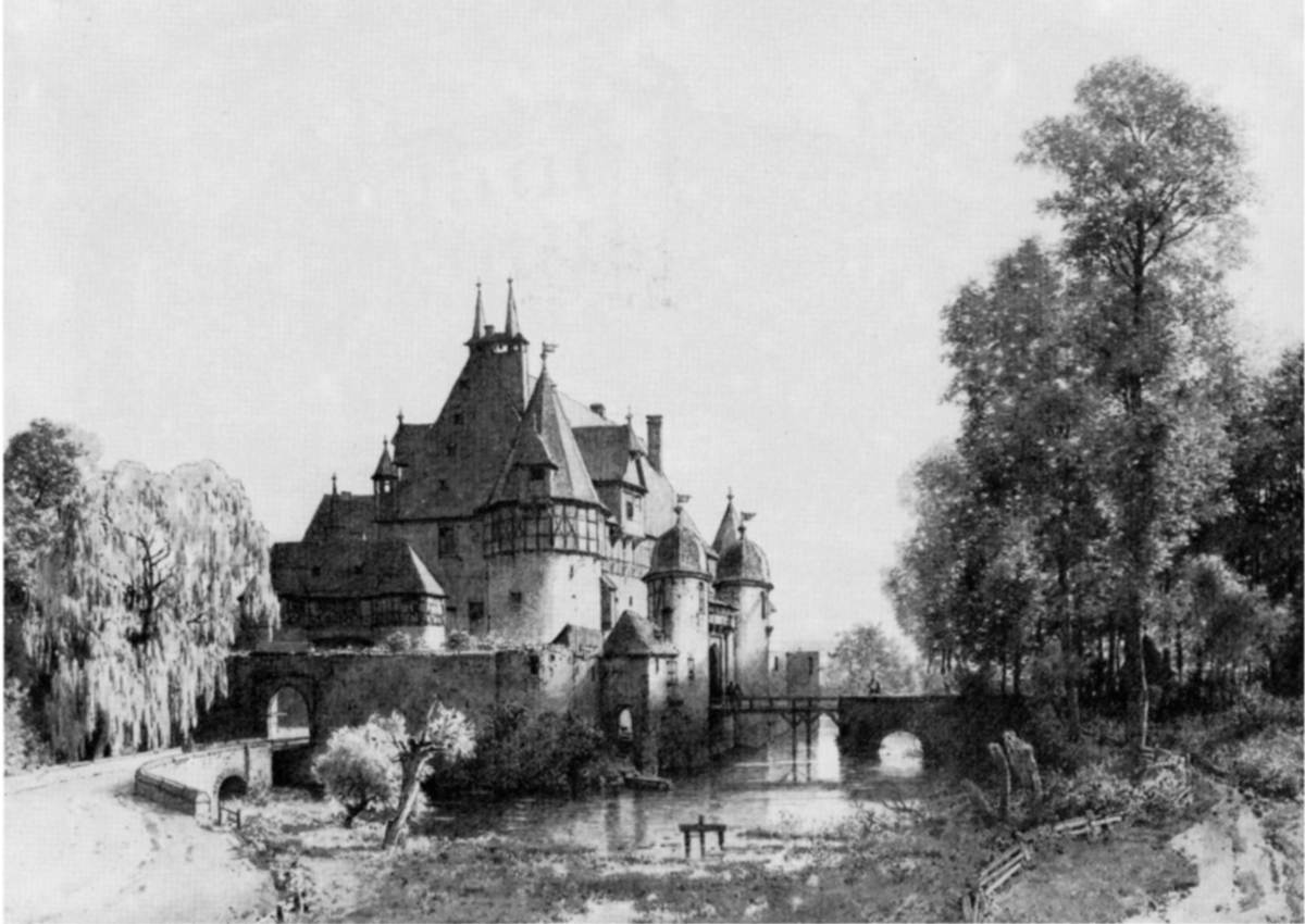 Das alte Rödelheimer Schloss. Bezeichnung in unterer linker Bildecke: "Darstellung des alten Rödelheimer Schlosses (bereits 1800 abgebrochen!)"